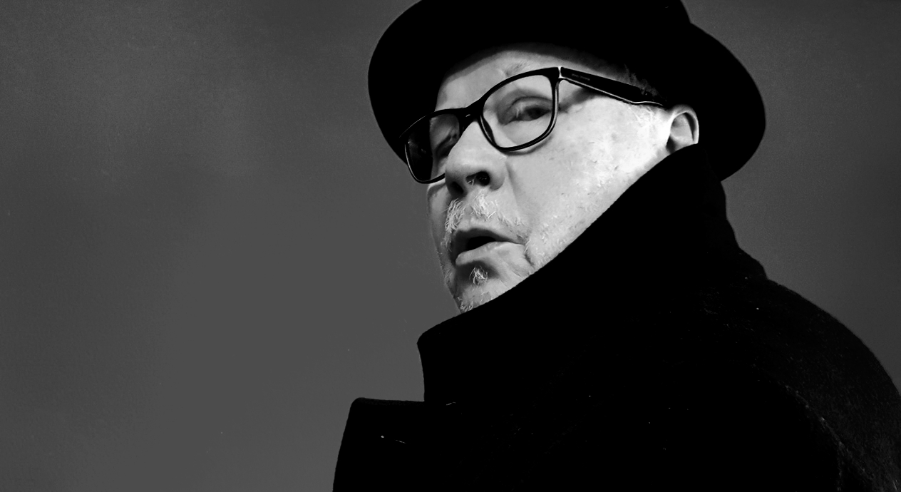 Charly Weller, November 2018